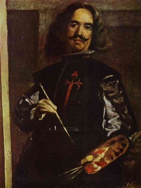 Detail van het schilderij in het Prado. Dit is een zelfportret met het kruis van de Orde van Sint Jacob van het Zwaard.